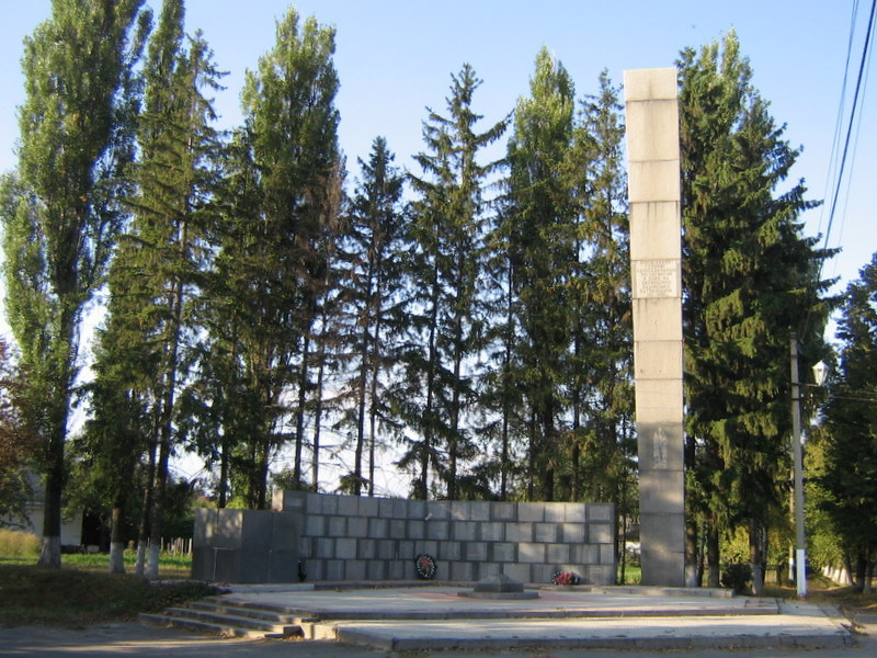 Обеліск Слави